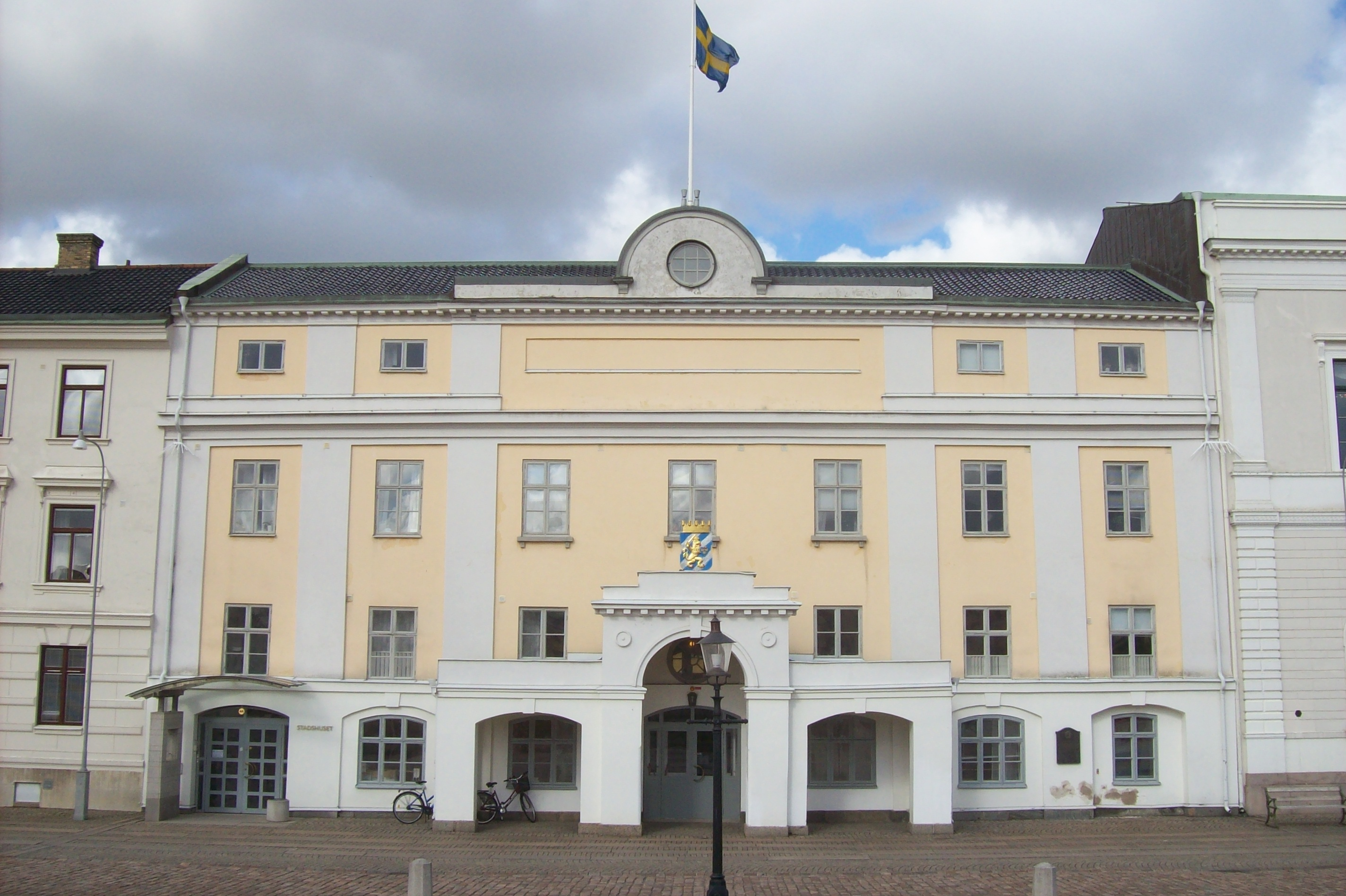 Nordstaden 16:2 Hus 1b. Göteborgs Stadshus. Göteborg. Sett från Gustaf Adolfs Torg.